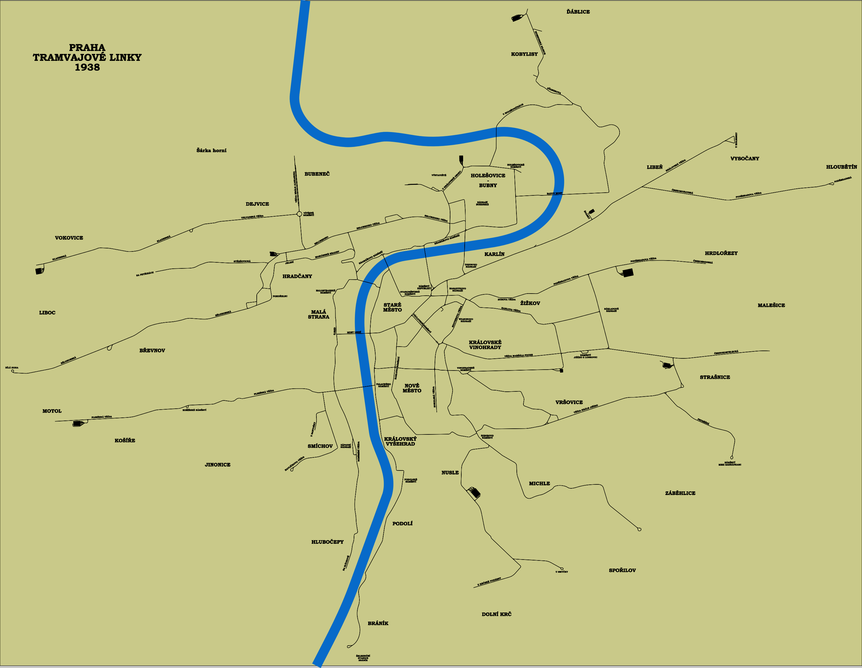 PRAHA - TRAMVAJOVÉ LINKY - 1938